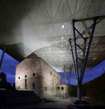 site de Lalibela, Teprin associés